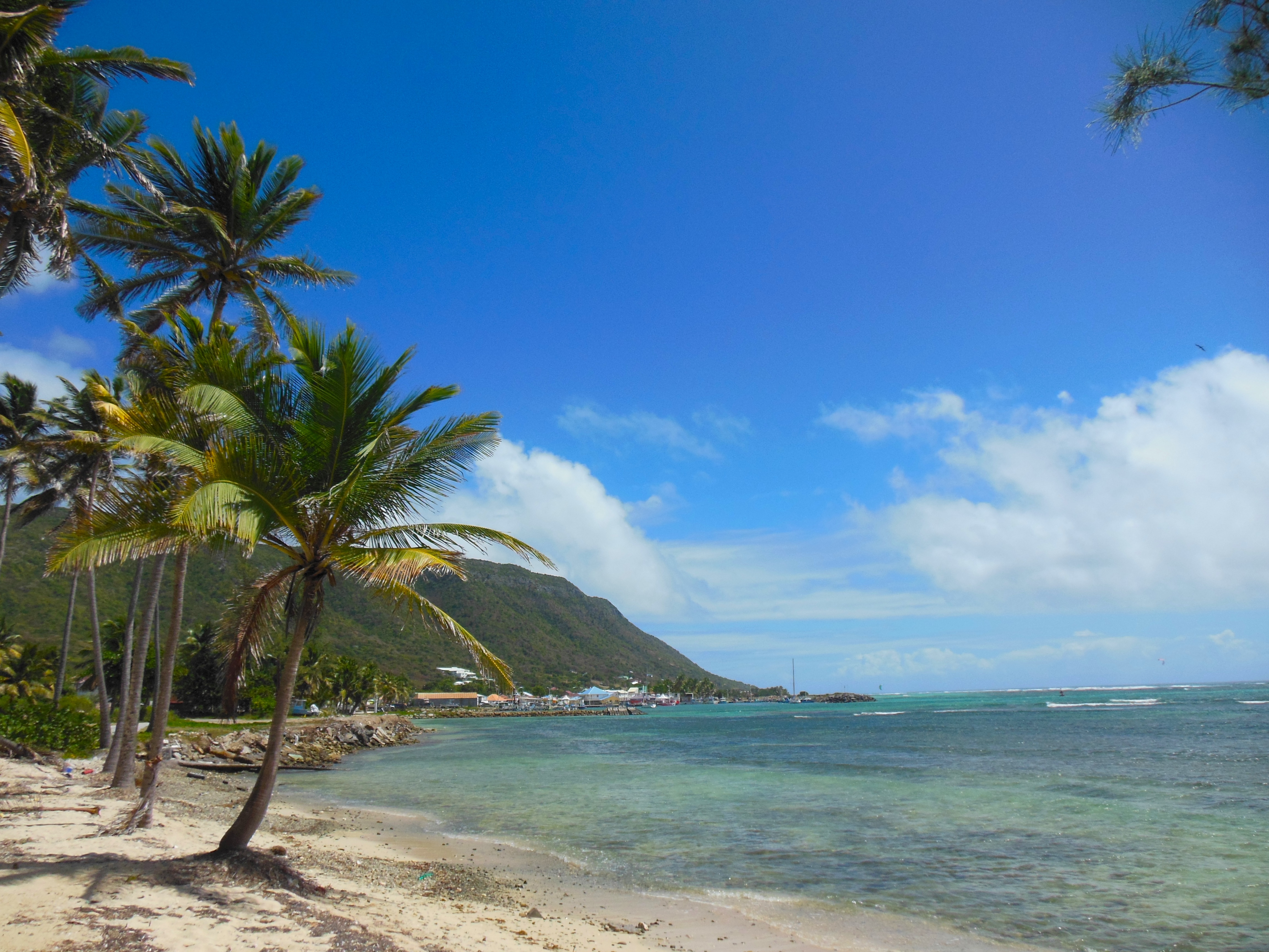 Plage de Beauséjour à La Désirade et vue sur l'Est de l'île